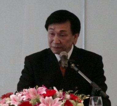 Wu Ching-kuo